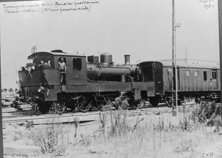 Il treno inaugurale della ferrovia Roma-Lido, trainato dalla locomotiva a vapore 910.045 delle Ferrovie dello Stato.